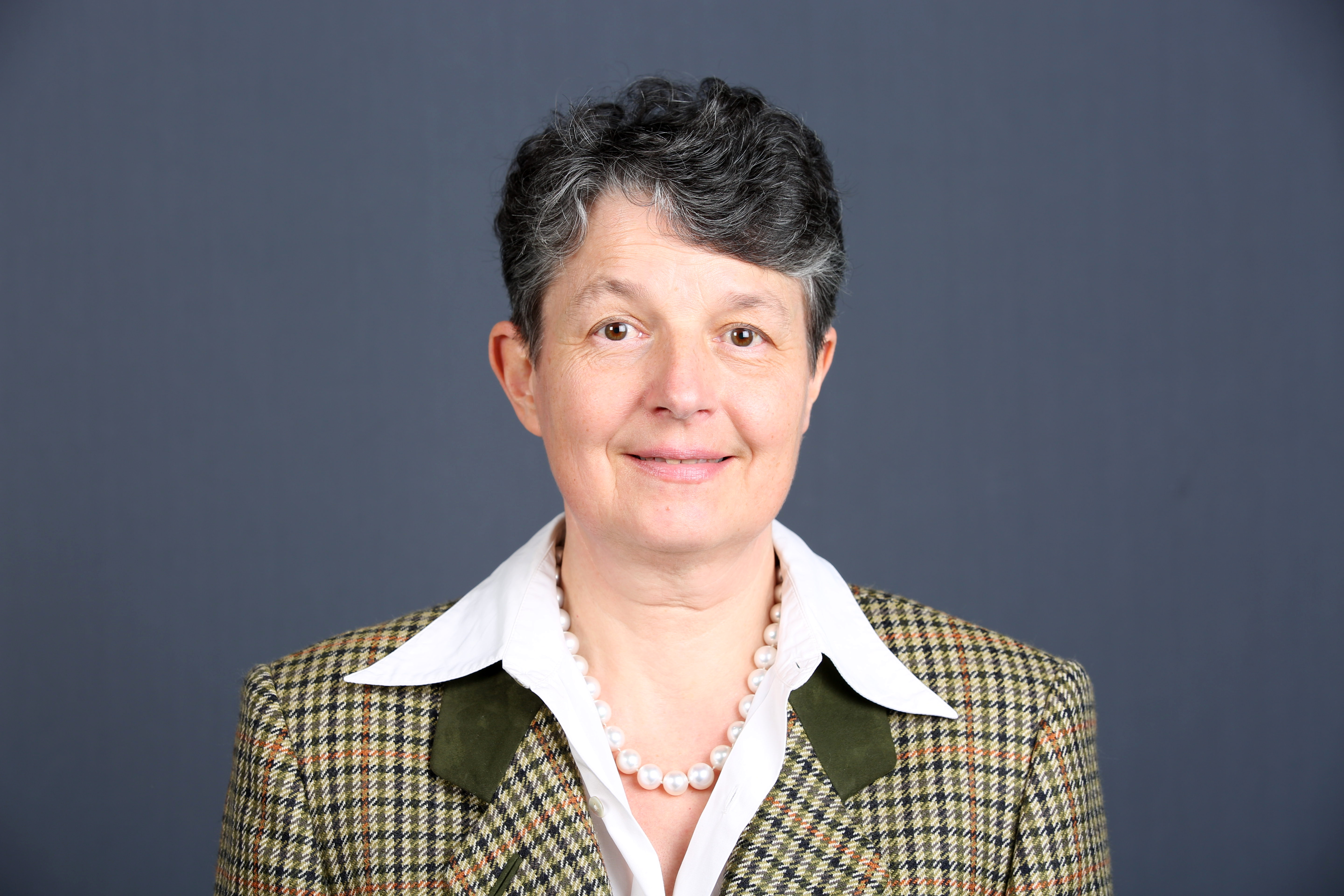 Dr. Kirsten Muster (AfD)